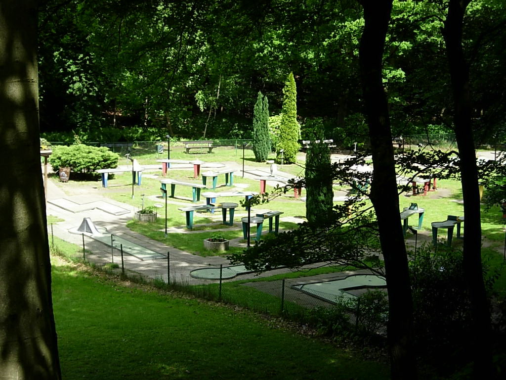 Volkspark Minigolf.